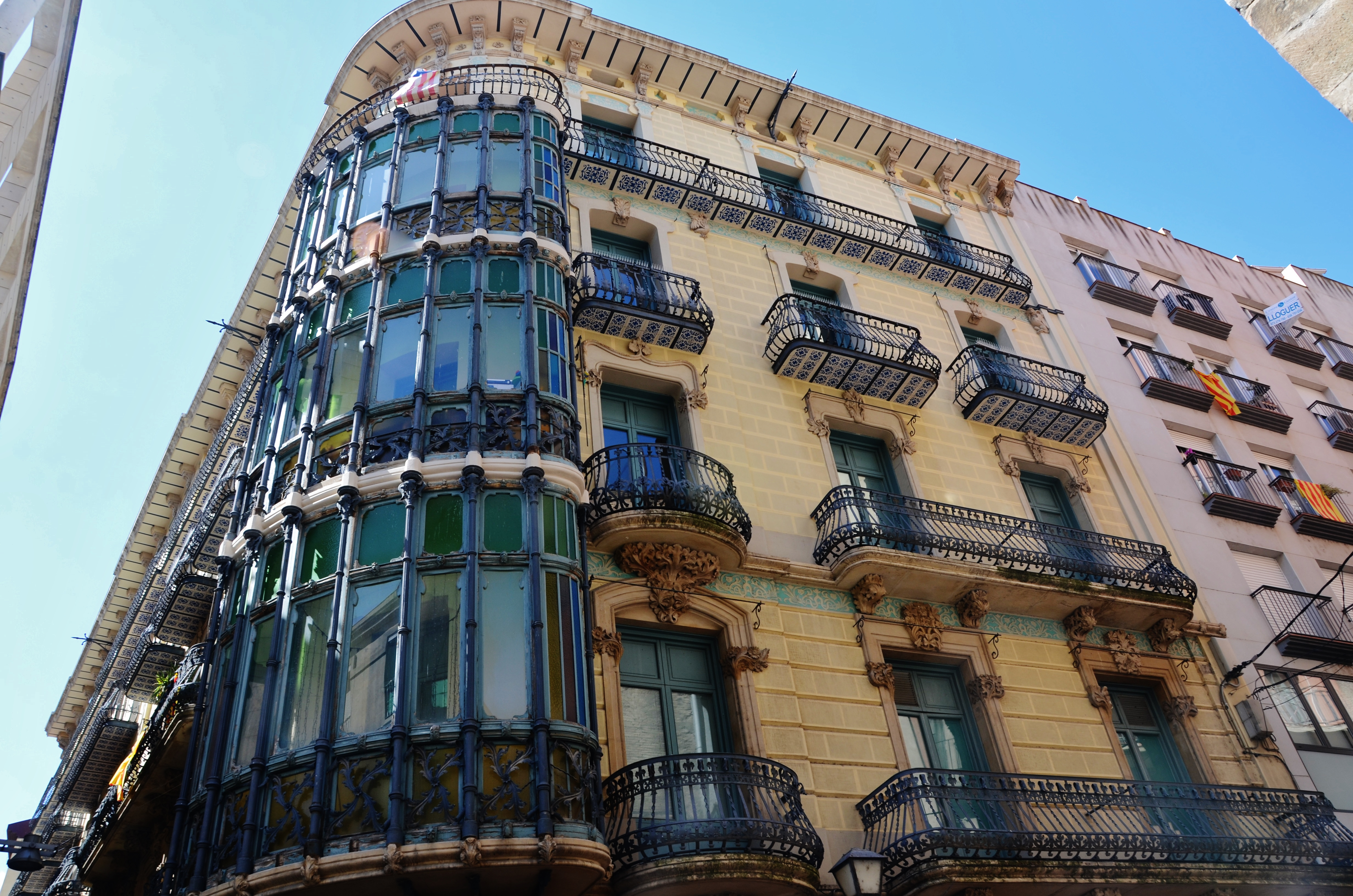 Casa Magí Llorenç. Lleida